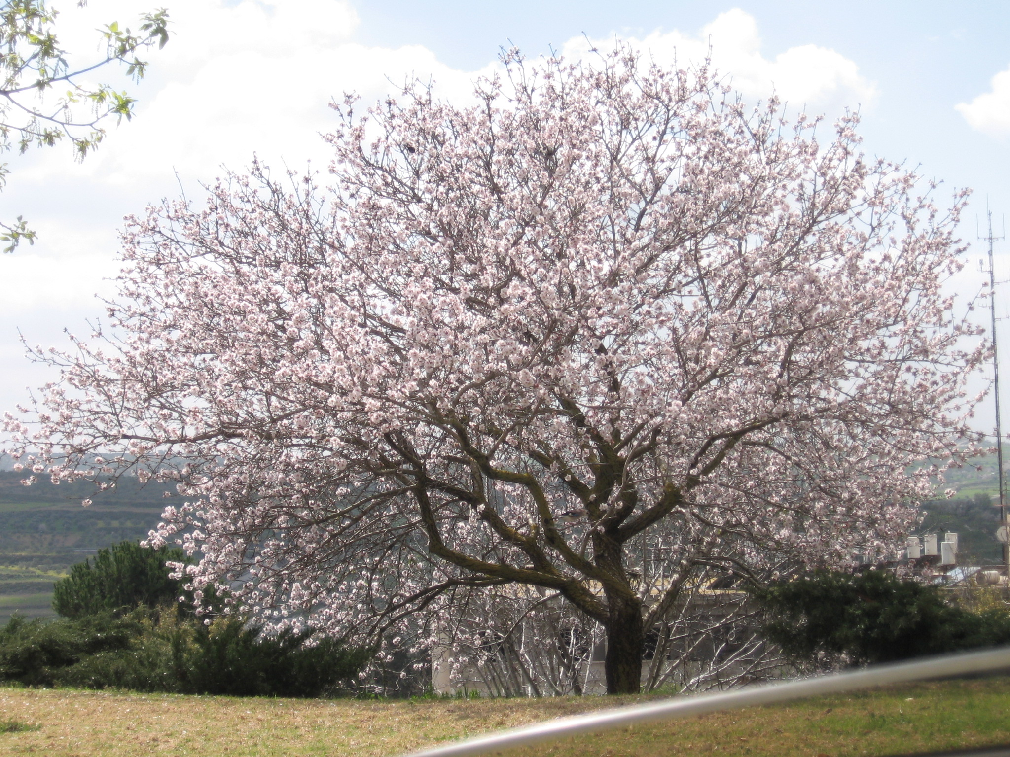 השקדיה פורחת בקדומים